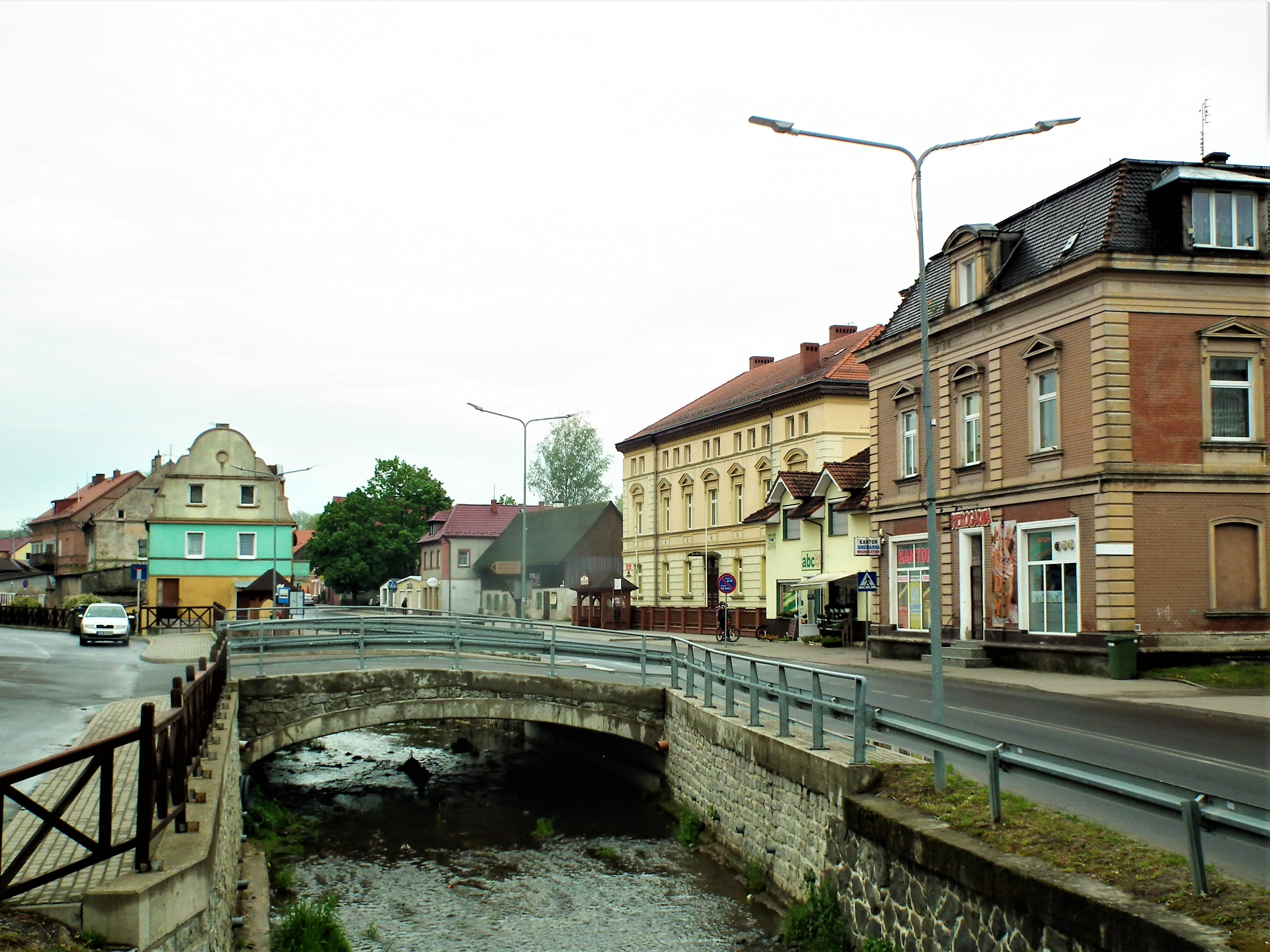 Centrum miasta Olszyna na Łużycach.